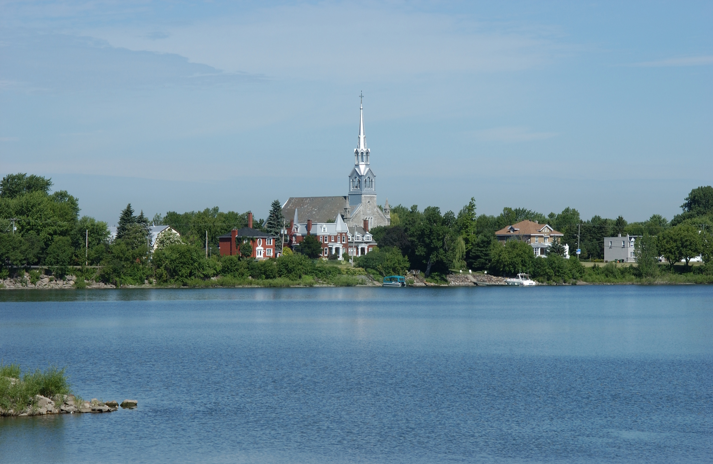 Église catholique Saint-Joseph-de-Chambly